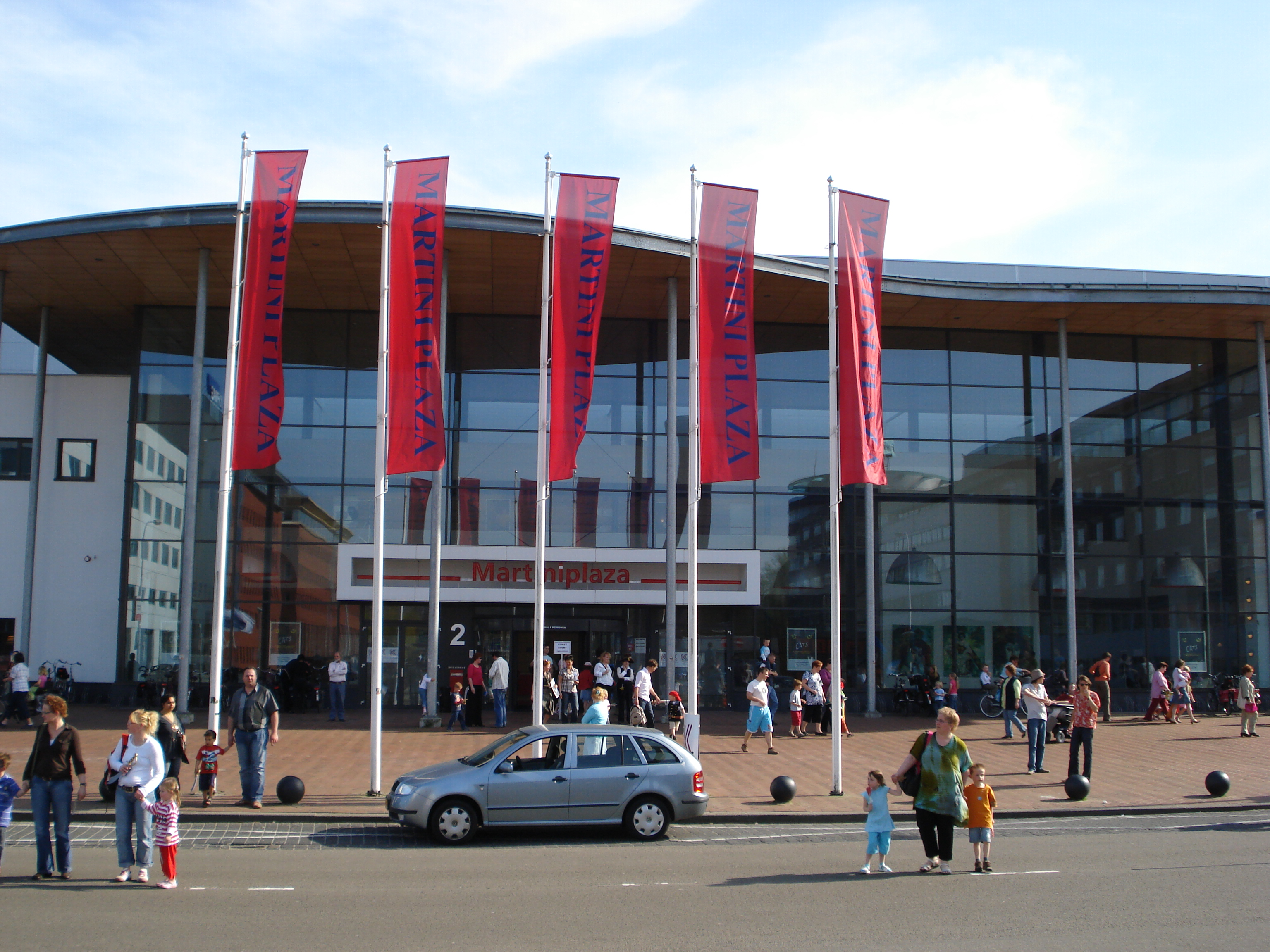 Martiniplaza na afloop van een (kinder)musical.